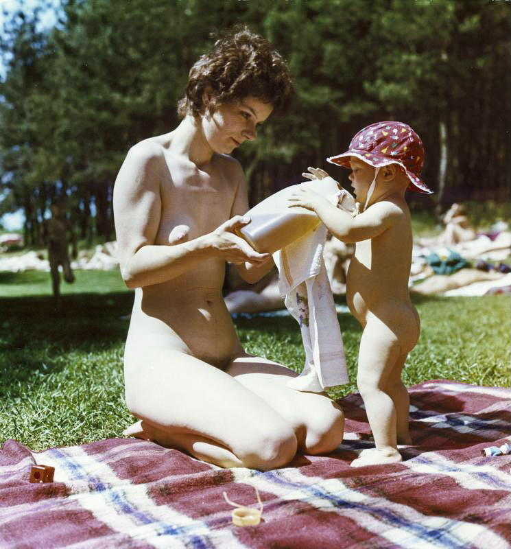 ADN-ZB/Hirndorf/4.8.83/Frankfurt/Oder: Am FKK-Stand Herzsprung. Einer der beliebtesten Badestrände im Kreis Angermünde ist der FKK-Strand bei Herzsprung. Hier haben die Werktätigen des Kreisbetriebes für Landtechnik Angermünde in langer und beharrlicher Arbeit ein Freizeit- und Erholungszentrum für alle geschaffen.